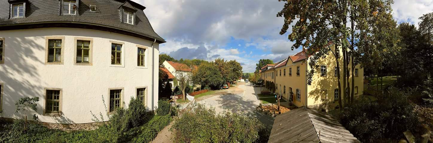 Park-seitiger Blick in den Innenhof des Rittergut Adlershof